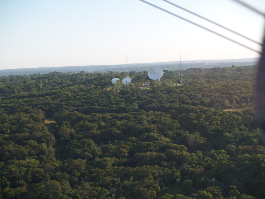 Estación terrena de Areguá